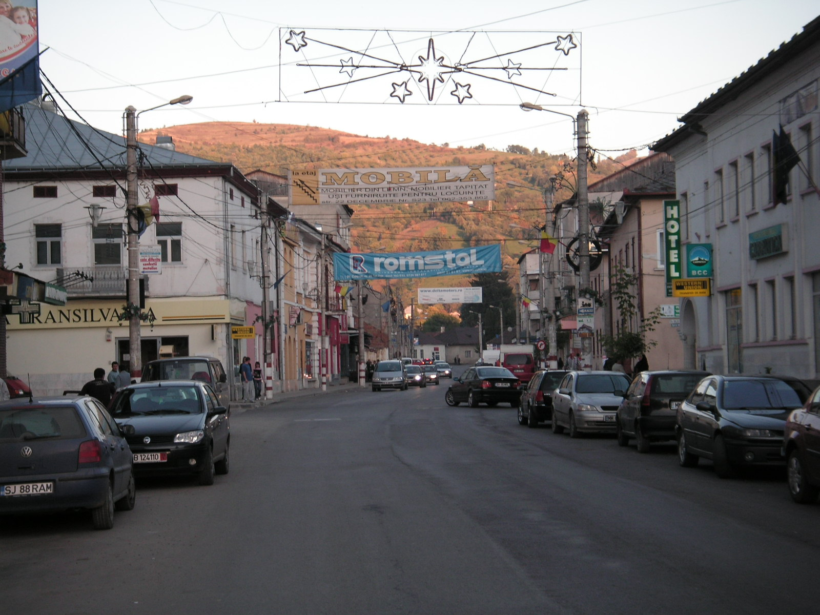 Central Vişeu de Sus